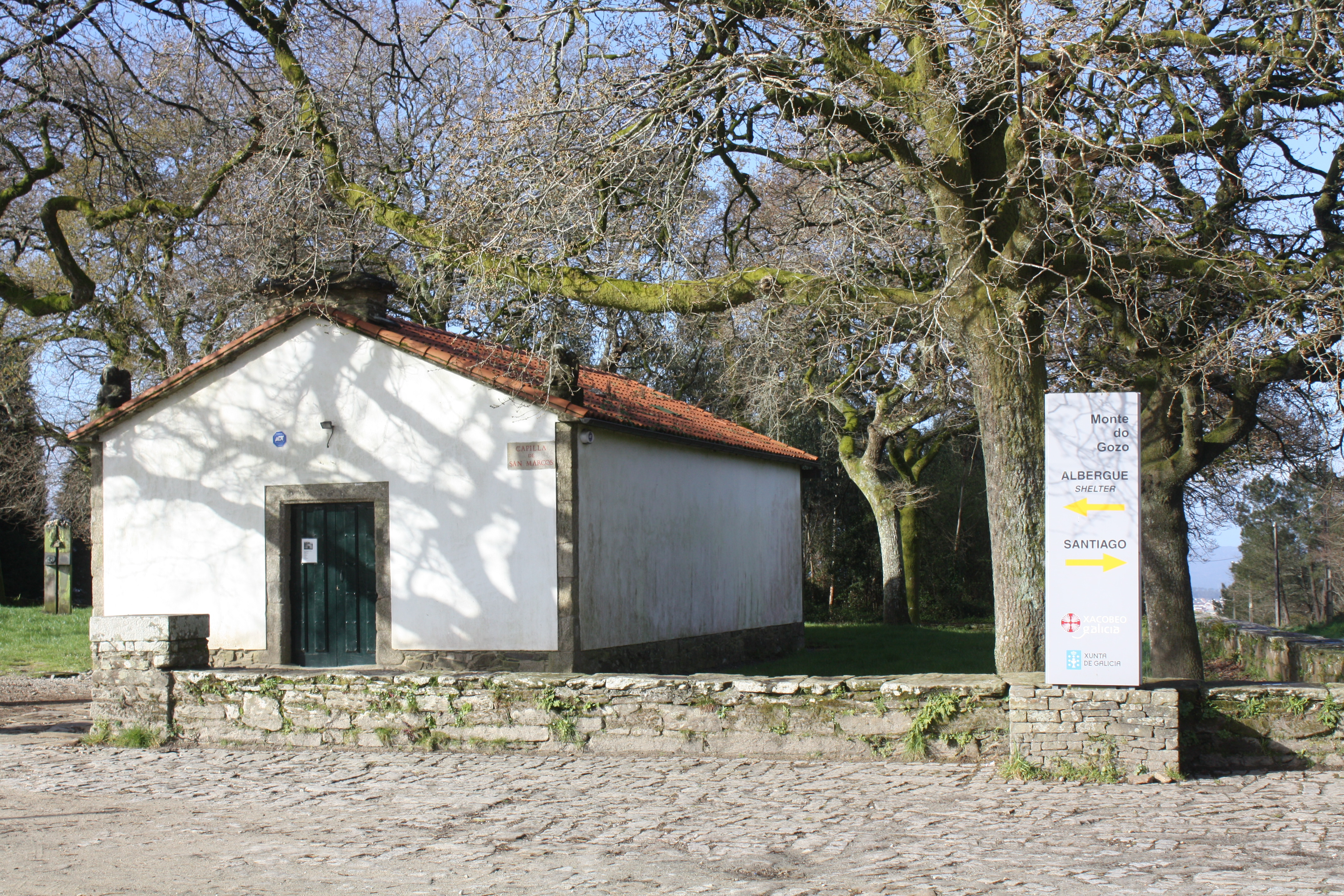 Capela de San Marcos no Monte do Gozo (lugar de San Marcos, parroquia de Bando, Santiago de Compostela).